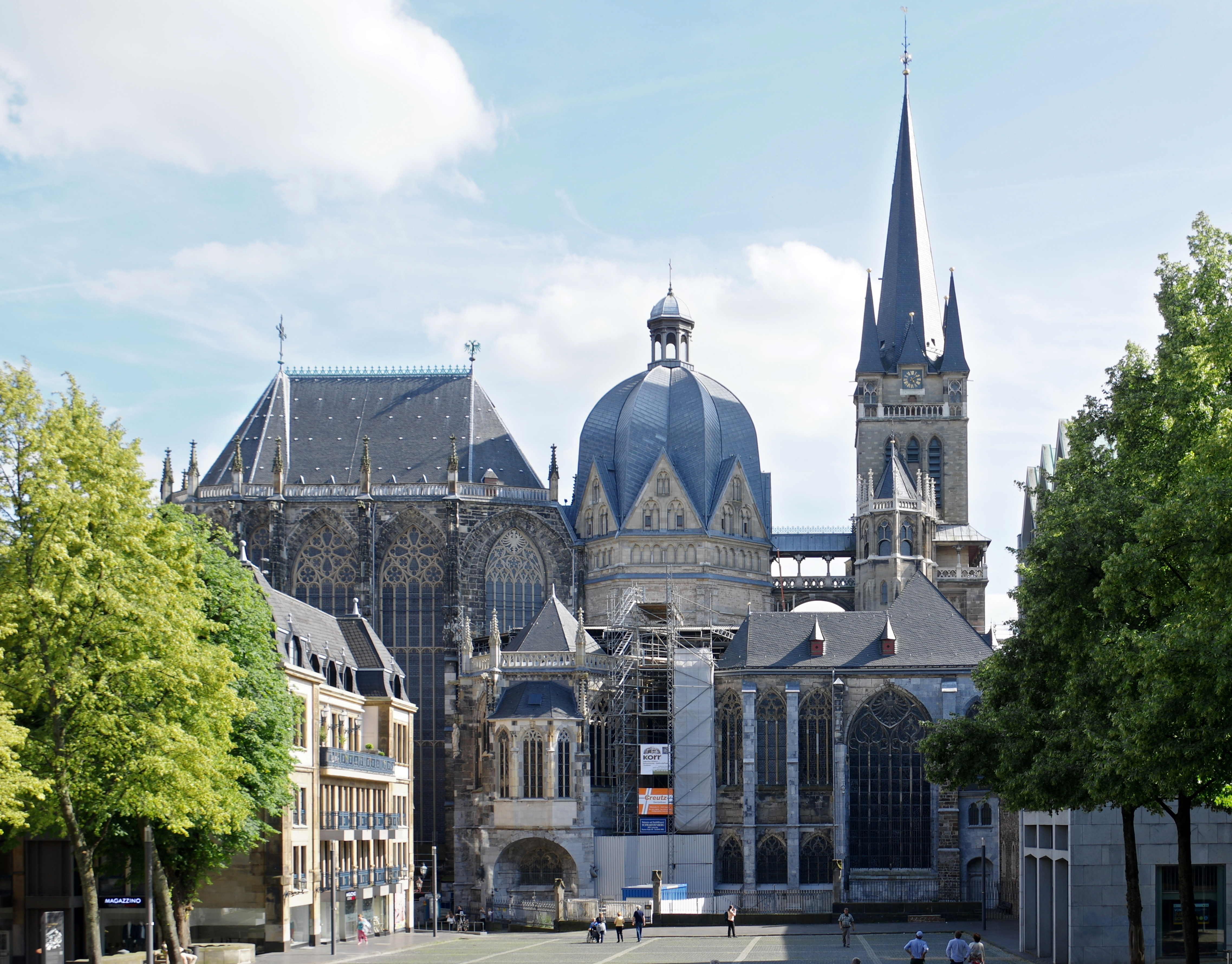 Aachen, Dom vom Katschhof